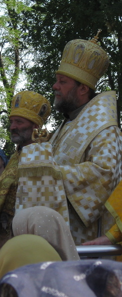 August, 2012 - Sfinţirea Catedralei Sfântul Prooroc Ilie din Teleneşti. ÎPS Vladimir, Mitropolitul Chişinăului şi al Întregii Moldove (dreapta) împreună cu preotul paroh Vasile Ţurcan (stânga).